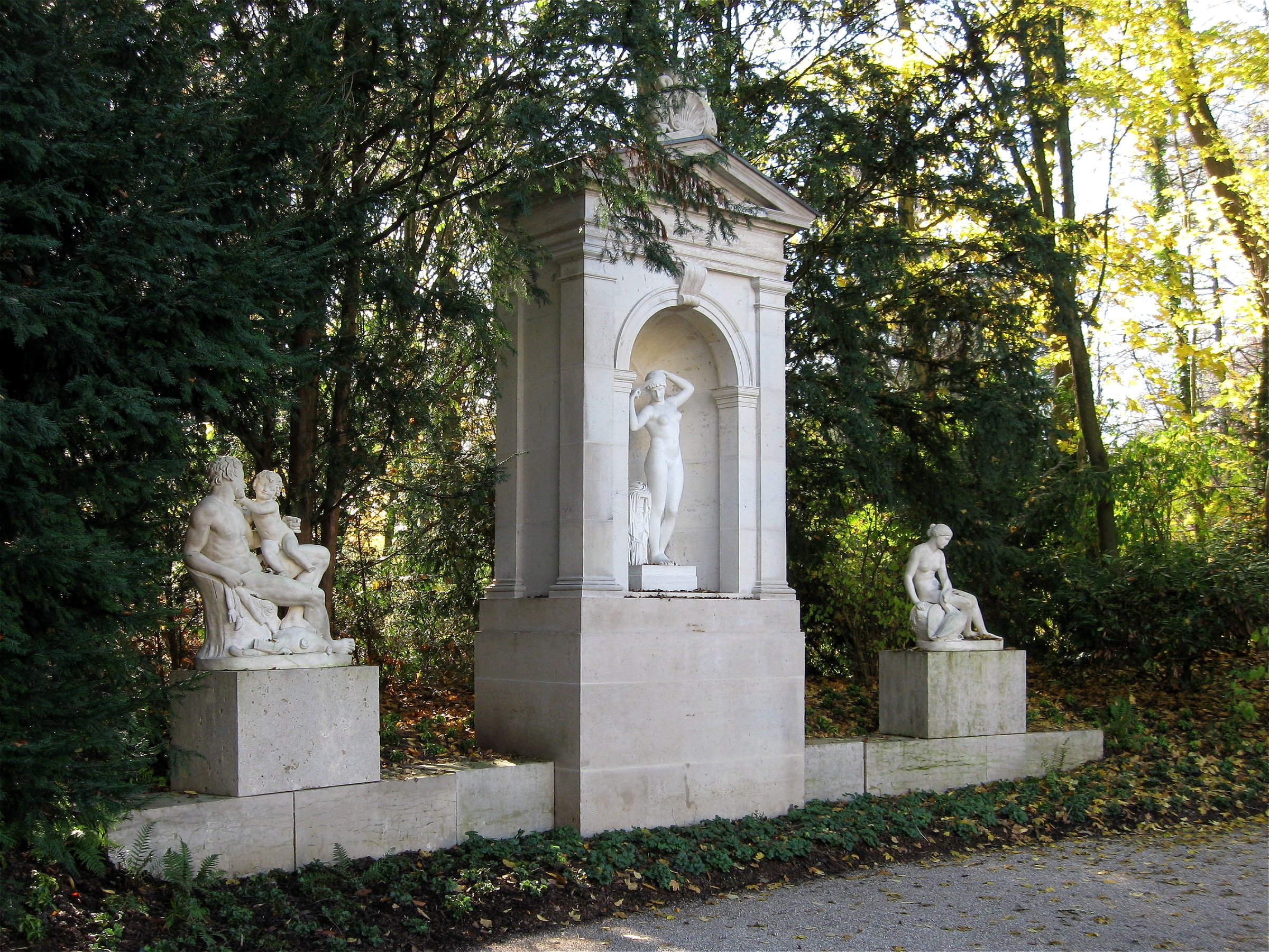 Südlicher Kabinettsgarten im Schlosspark Nymphenburg